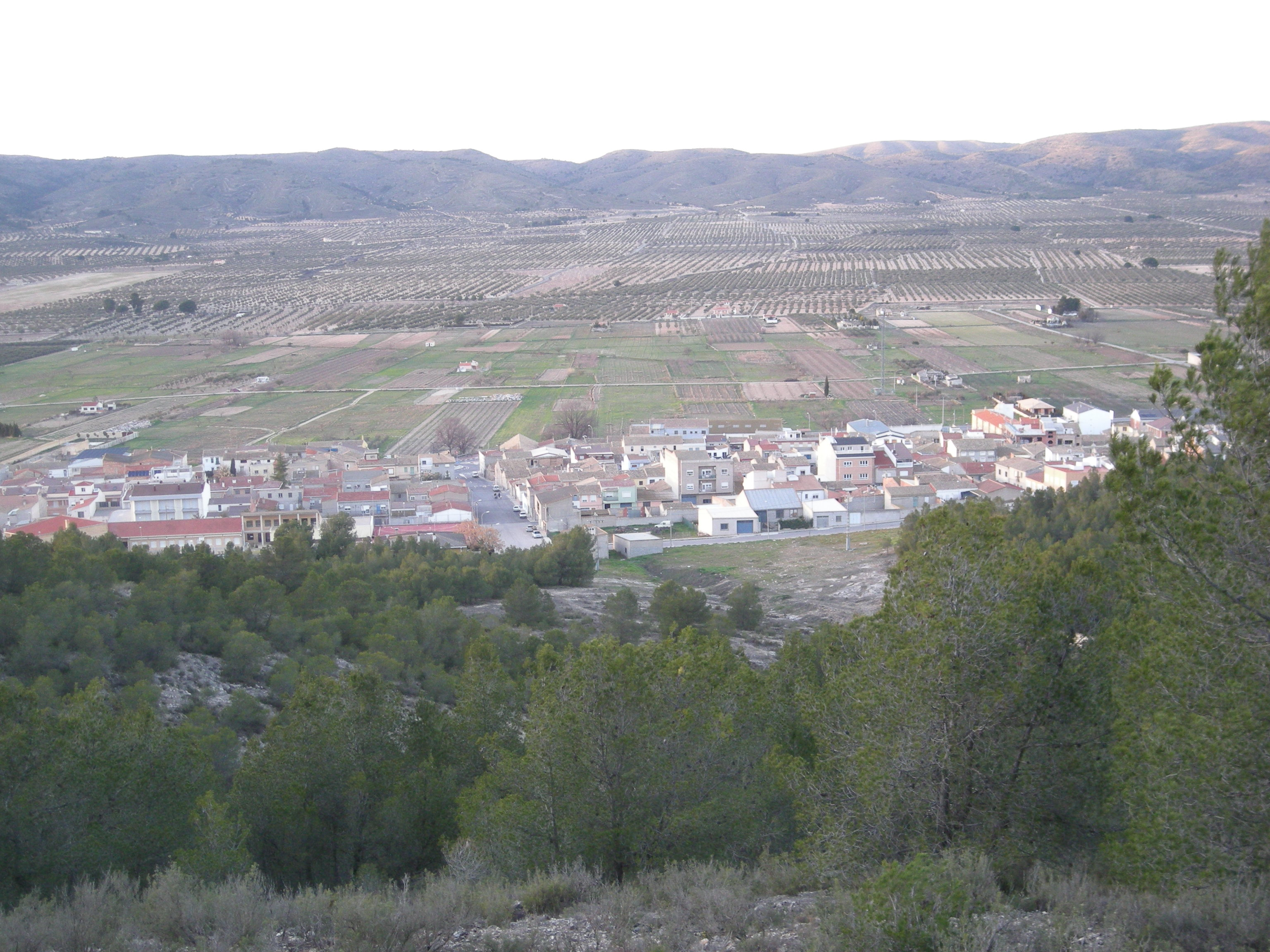 Vista de la Cañada desde la Sierra de la Villa (sendero SL-CV 76).